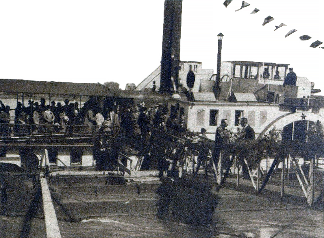 Bad Deutsch-Altenburg, Wiedereröffnung des Landungsstegs an der Donau; Dampfer der Tschechoslowakischen Donau-Schiffahrts-Aktiengesellschaft (ČPSD)